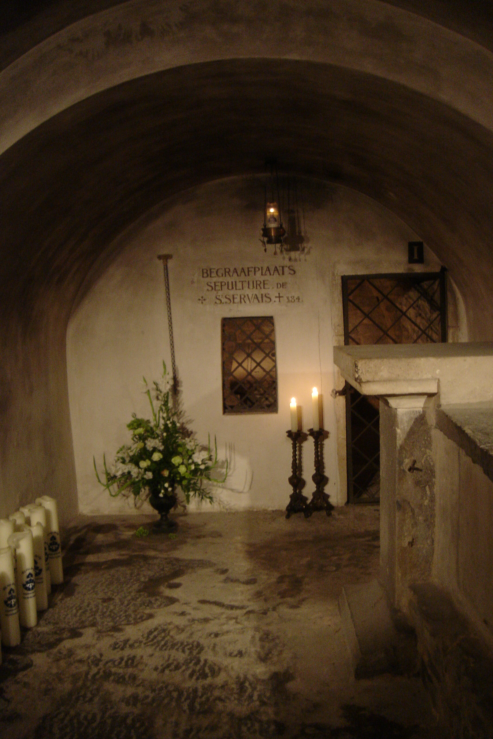 Crypte uit 550 met graf St.Servaas (achter tralie-raam)